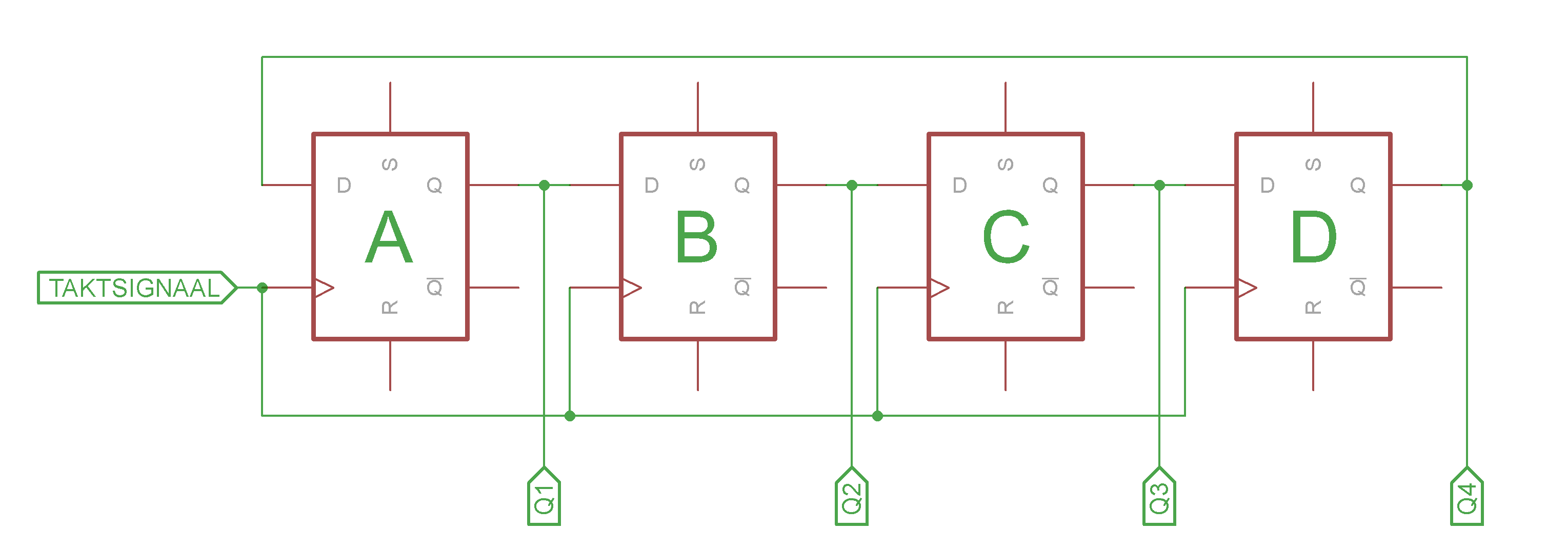 D-trigeritest koostatud 4-bitine otsese tagasisidega ringloenduri elektriskeem.